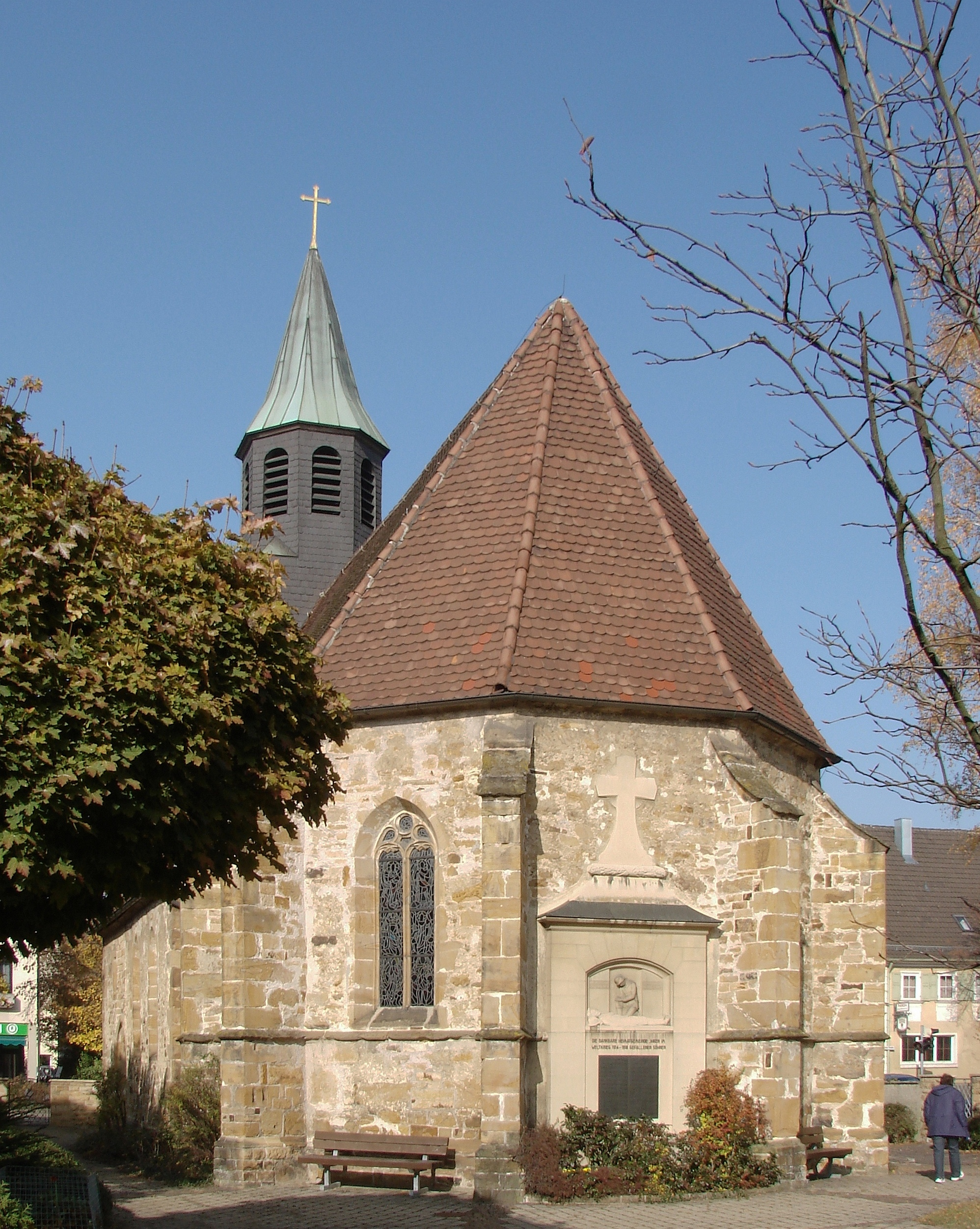 Süßen, Germany, Alte Marienkirche